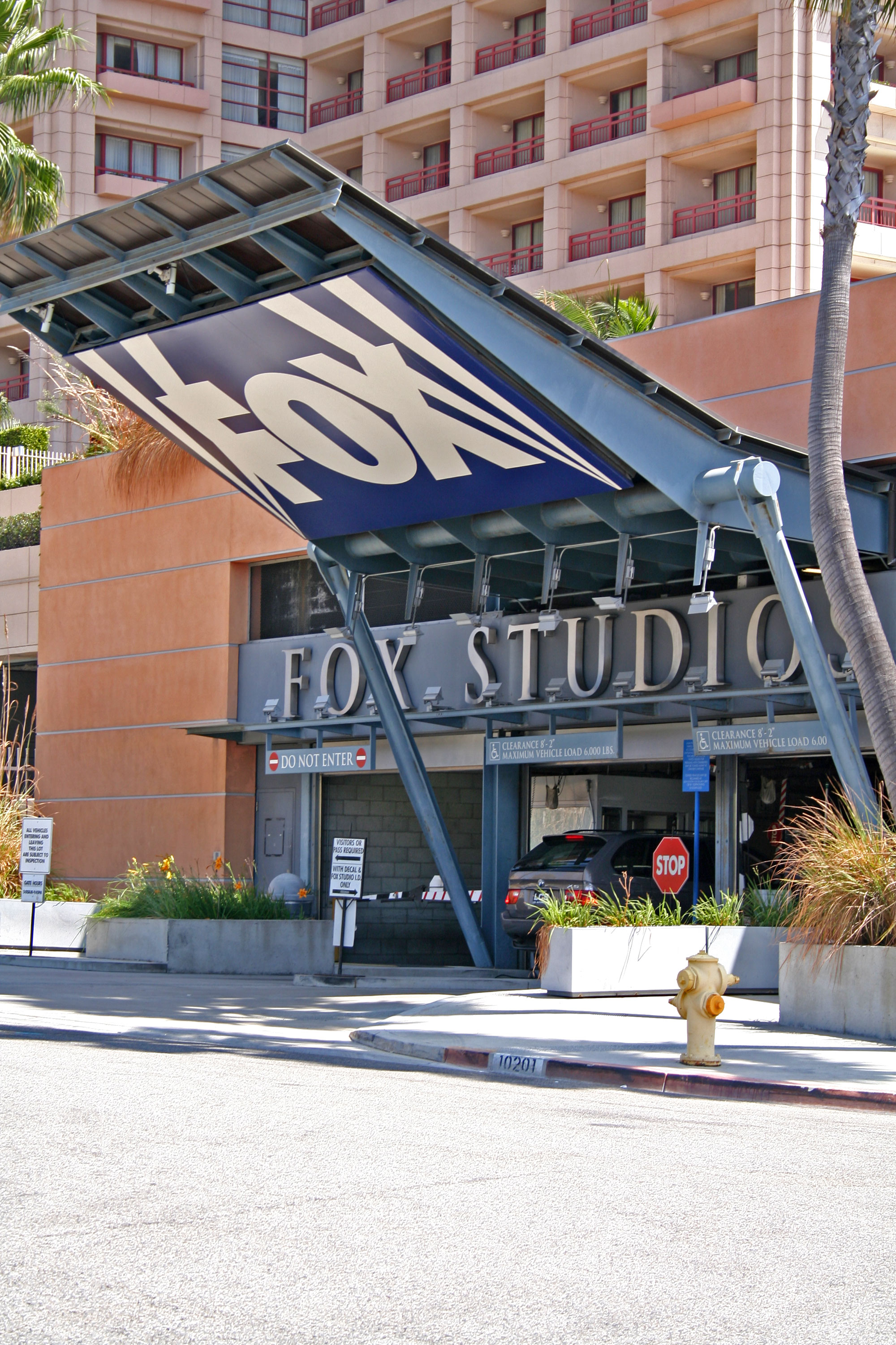 tom bernard